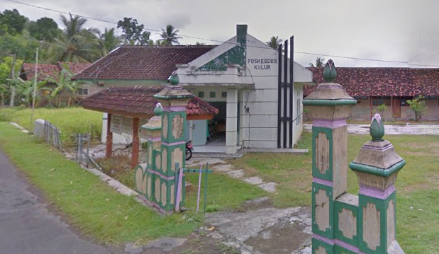 Poskesdes Kulur yang terletak di Pedukuhan Bojong, Desa Kulur, Kecamatan Temon. Merupakan fasilitas kesehatan di Desa untuk mendukung dan mempermudah pelayanan kesehatan di tingkat dasar.